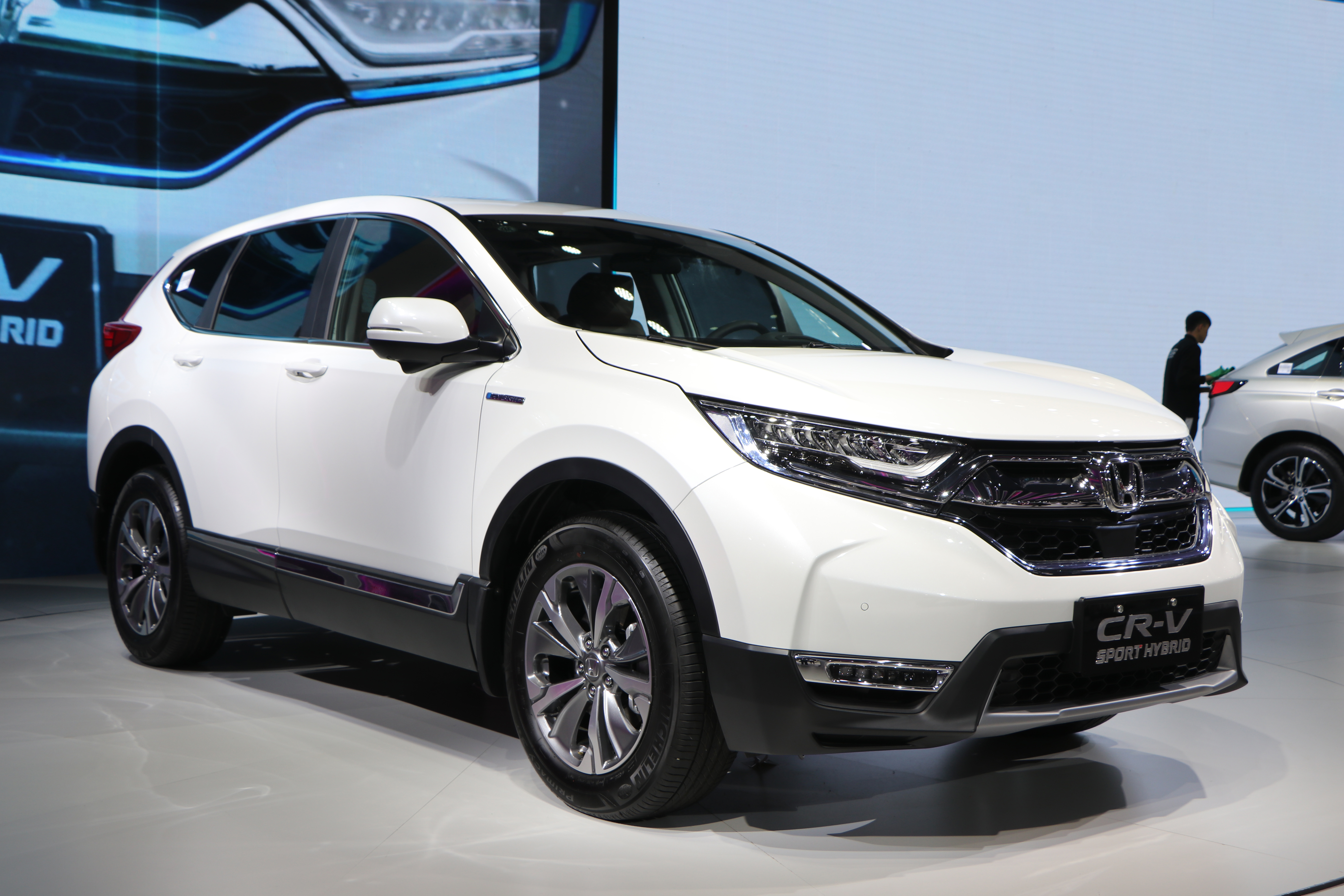 东风本田CR-V（XV70）混动版